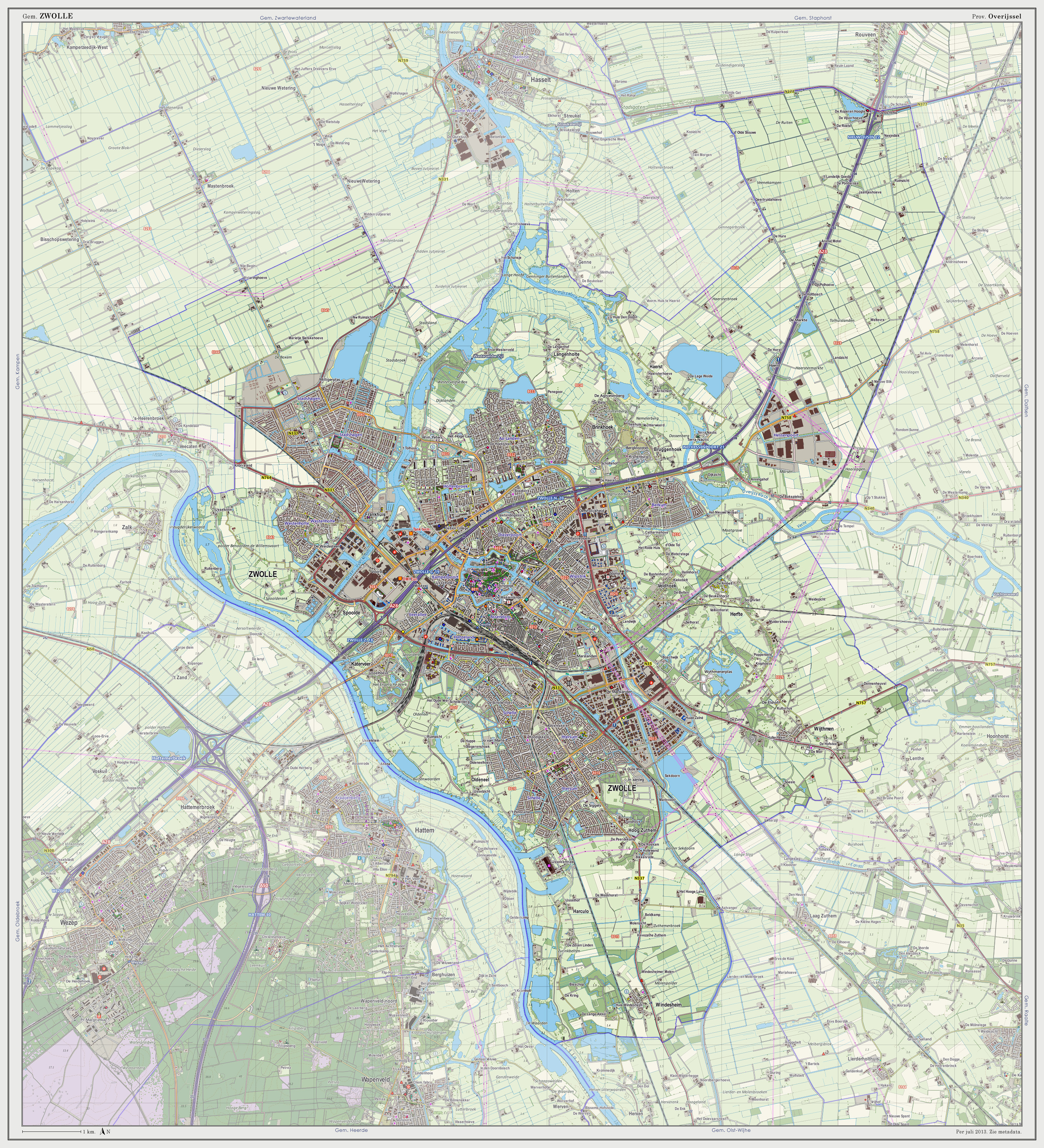 Topografische kaart van gemeente Zwolle (2013). Samengesteld door Jan-Willem van Aalst op basis van de GML open geodata van de BRT/Top10NL (basisregistratie Topografie, Kadaster 2011), vrijgegeven door Kadaster onder de Creative Commons BY licentie. Additionele gegevens uit BAG (8 juli 2013), uit de Open Street Map (9 juli 2013) en uit de Risicokaart. Peildatum kaartbeeld: 9 juli 2013. Zie ook Gemeentenatlas.nl Samenstelling en kleurenschema: Jan-Willem van Aalst, met QuantumGIS en Photoshop. Zie ook de Legenda.